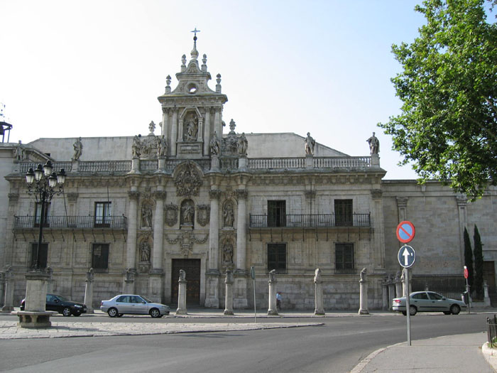 Valladolid – España (Spain) - Universidad: Comenzó su construcción en el año 1472. La capilla data de 1517. La fachada actual, labrada en piedra de Campaspero, es de 1718 y es considerada una de las obras más importantes del barroco vallisoletano.